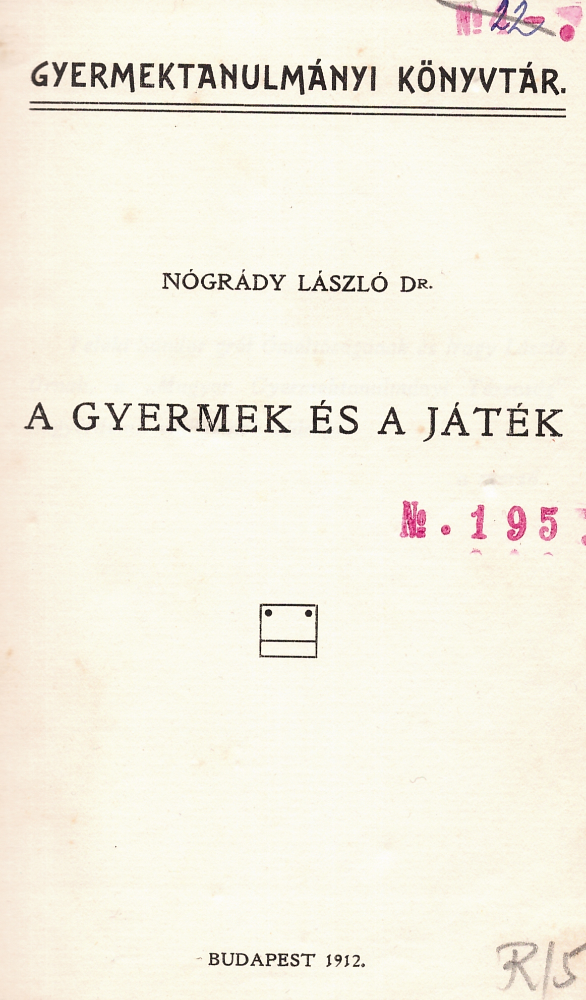 Nógrády László (1871-1939): A gyermek és a játék (1912)